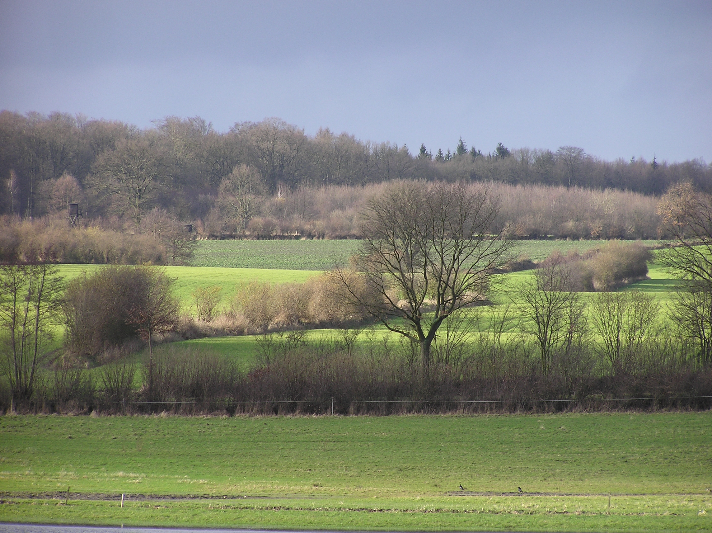 Knicklandschaft bei Köthel. – Die Bille (Grenze zwischen Kreis Stormarn und Herzogtum Lauenburg) durchfließt das Gebiet von Ost nach West (von rechts nach links im Bild auf 1/3 Bildhöhe). Vor der Bille ist es Gebiet der Gemeinde Mühlenrade (Lauenburg), dahinter befindet sich das Gemeindegebiet Köthel (Stormarn), der Wald dahinter ist der Bullenberg im Naturschutzgebiet Hahnheide. – Kamerastandpunkt: Radweg der L220 Blick in ca. NordNordWest; +53° 35' 58.14" N, +10° 29' 32.08" O. - OpenStreetMap (Info)